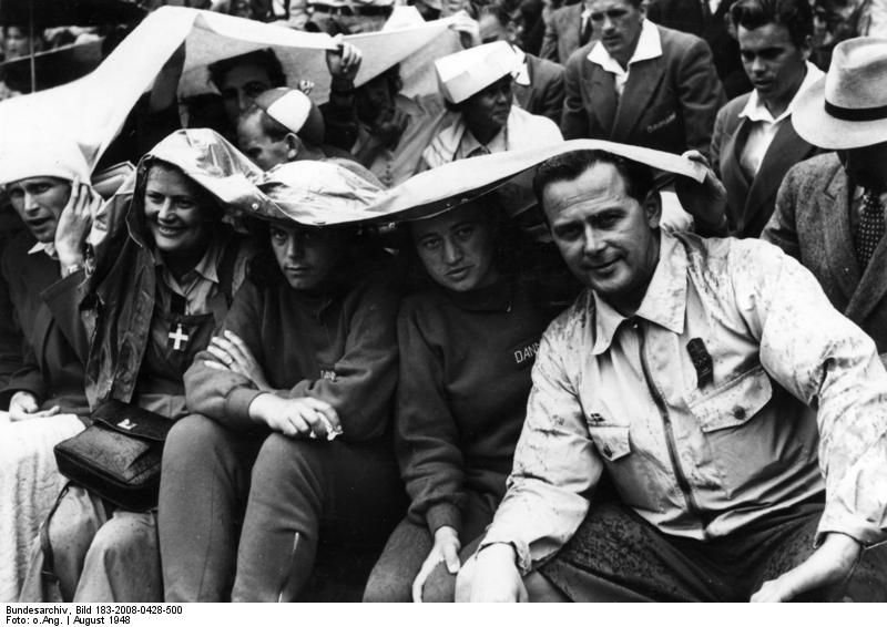 London, Olympiade, Zuschauer im Regen Illus-dpd Trotz Regen gute Laune: Die häufigen Regenfälle, die die glühend heissen Sommertage zu Beginn der Olympischen Spiele im Wembley Stadion ablösten, konnte weder die Zahl der Besucher noch die gute Laune der Zuschauer beeinträchtigen. Man hilft sich eben, so gut es geht, wie hier die dänischen Olympiateilnehmer, die sich mit einem Mantel gegen die Nässe von oben zu schützen suchen. 8-8-48 [Herausgabedatum] 1915-48